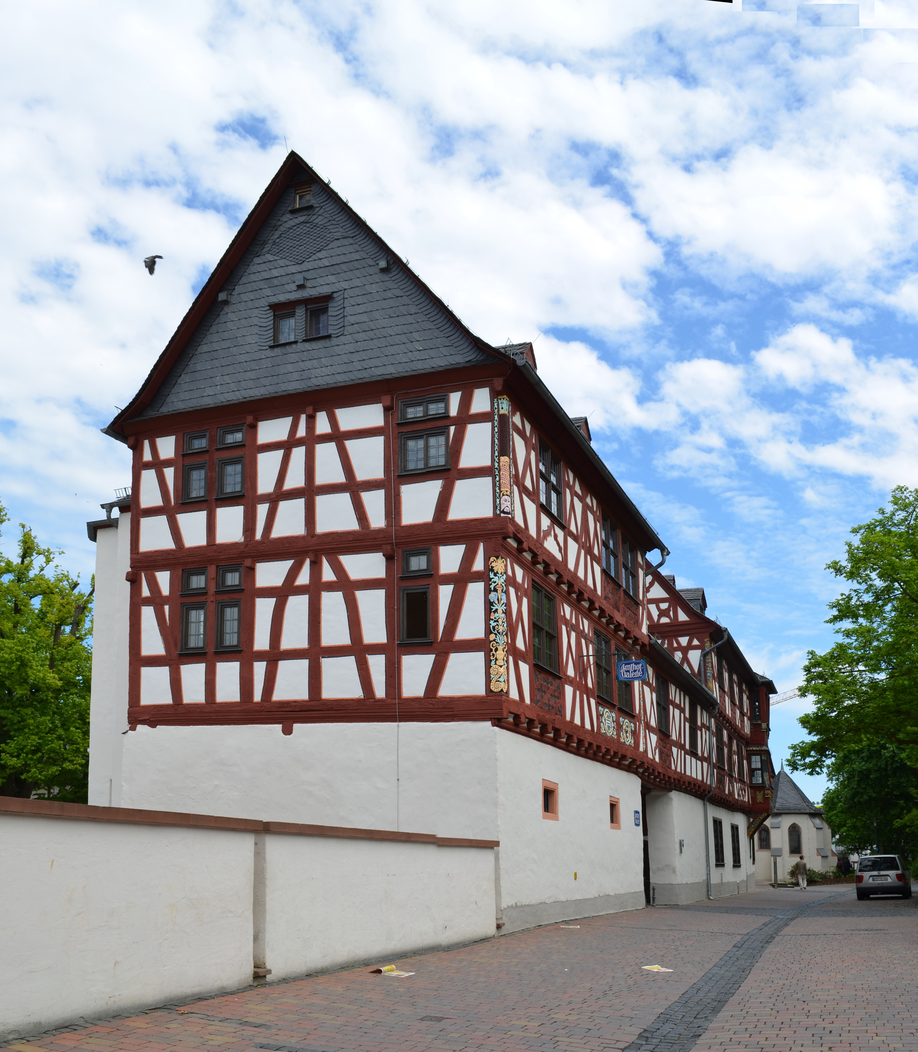 Bad Camberg, Amthof